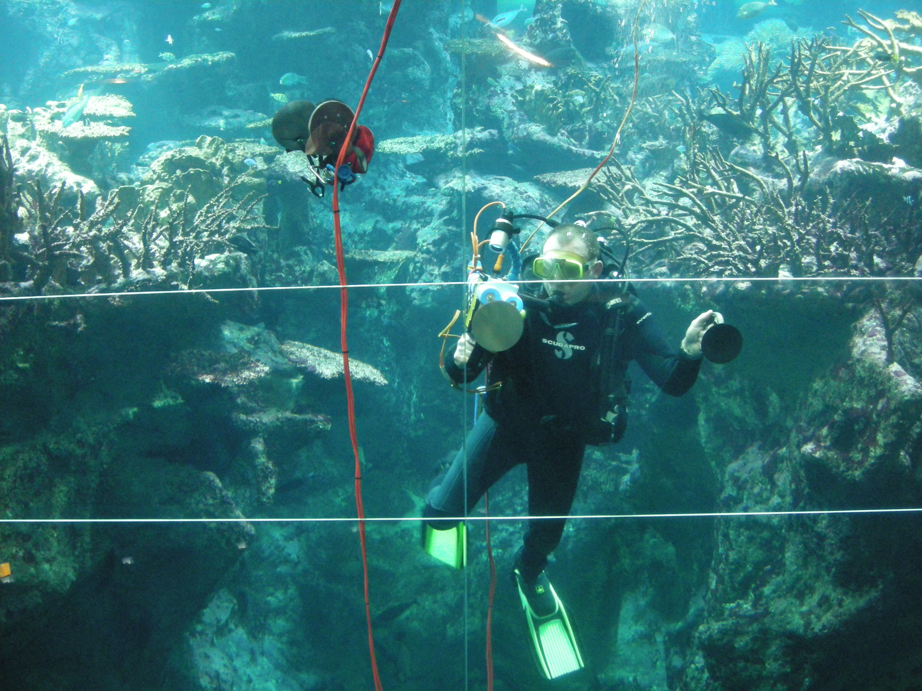 Plongeur dans l'aquarium de la Cité de la Mer à Cherbourg (Normandie)